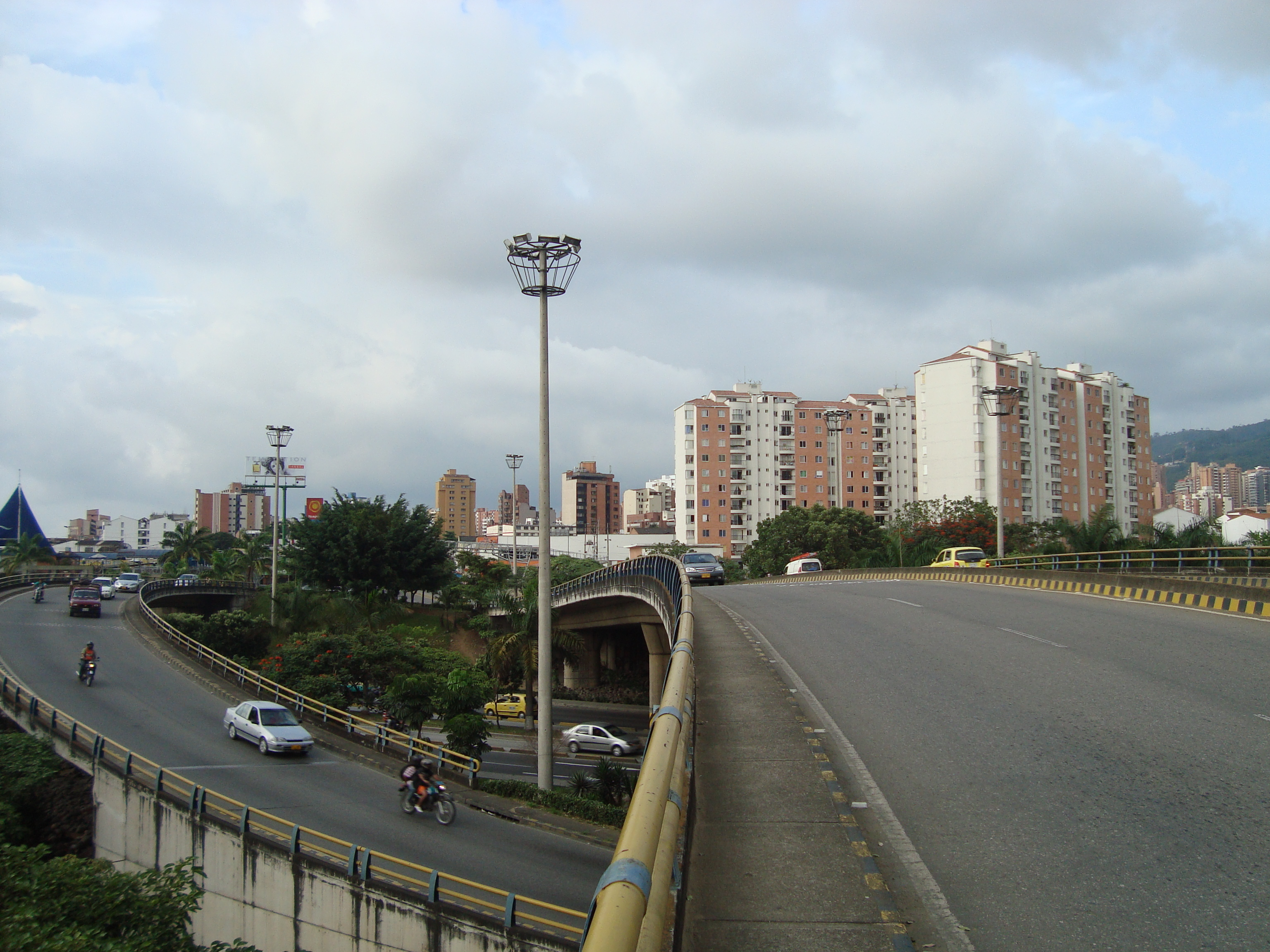 Intercambiador la puerta del sol en bucaramanga, que intersecta la cra 15 con 27.